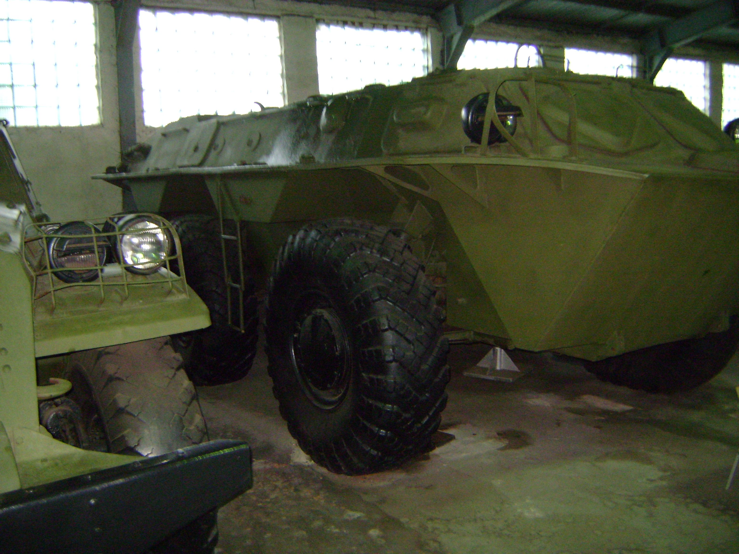 6x6APC soviet